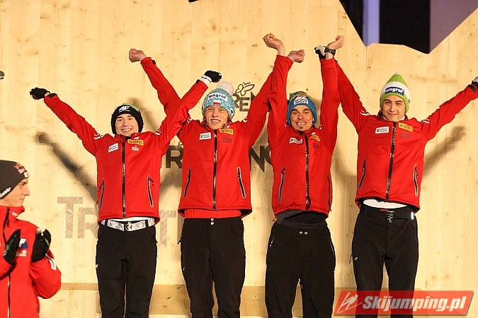 Dekoracja medalowa konkursu drużynowego mężczyzn na skoczni K-120